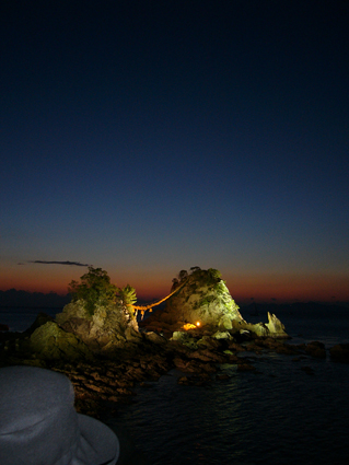 海上に浮かぶ豊後二見ヶ浦のジャンボしめ縄のライトアップは迫力があります。12月31日夜から翌1月1日朝まではオールナイトで点灯。